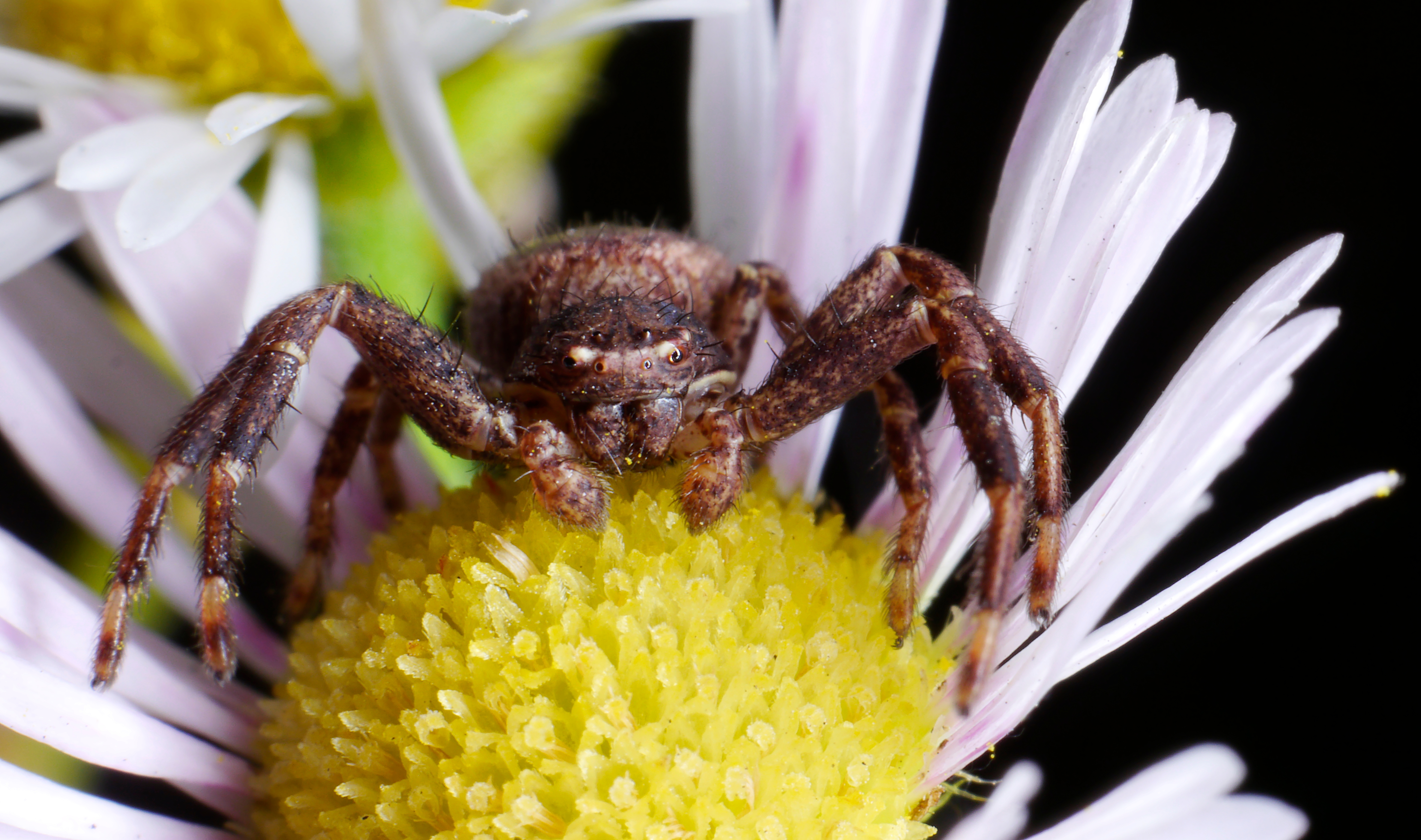 Krabbenspinne - Xysticus audax, Männchen. Artbestimmung durch Tobias Bauer. Aufgenommen in Mannheim-Vogelstang, Baden-Württemberg, Deutschland.